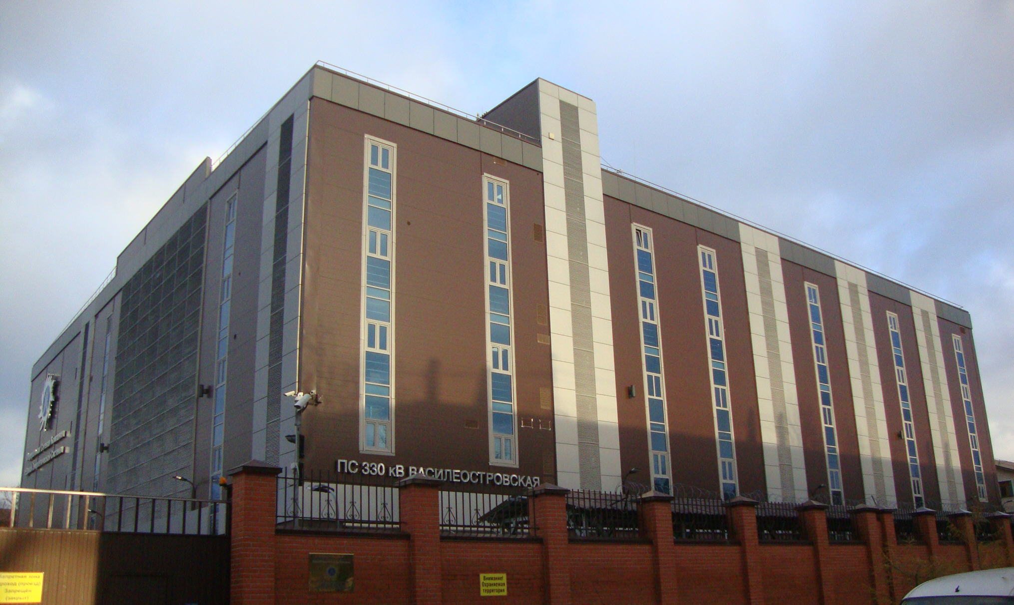 Россия, СПб, Переулок Декабристов, участок 1, 2018 год